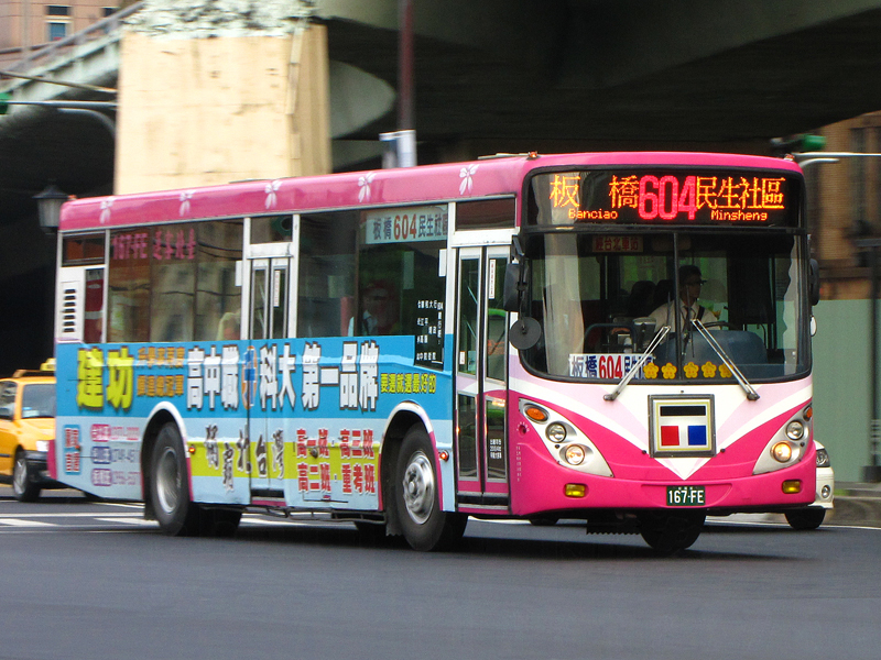 臺北客運大客車167-FE。